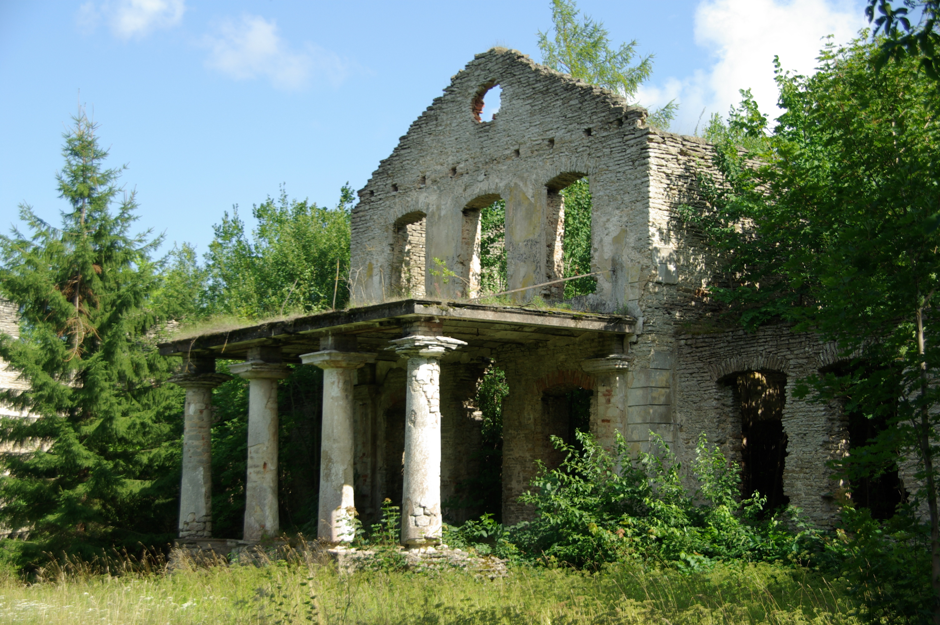 Mõisa peahoone asub Lääne-Virumaal Viru-Nigula valla territooriumil